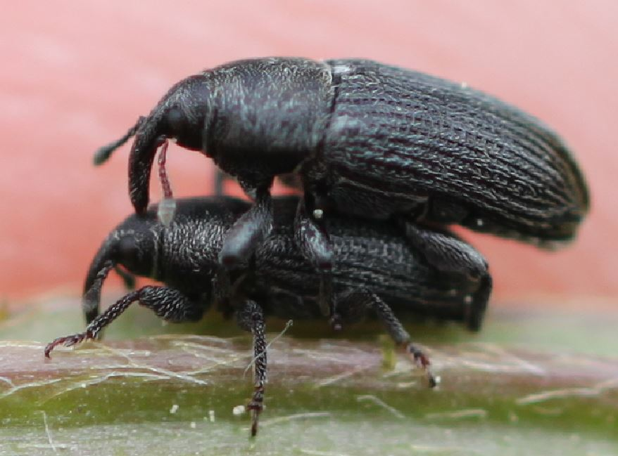 Paarende Rüsselkäfer der Art Mecinus pyraster am 3. Mai 2018 an Spitzwegerich in der Schwetzinger Hardt